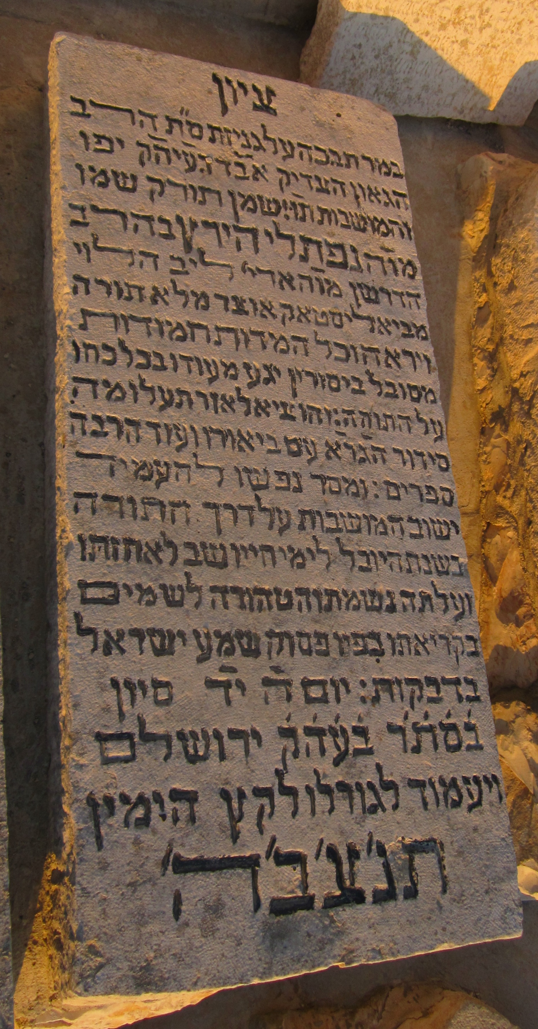 קבר הרב נפתלי הרץ הלוי בהר הזיתים